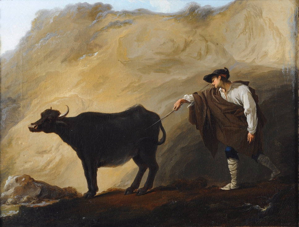 Jean Barbault (1718-1762) Berger et bufflonne quittant une grotte Huile sur toile - 49 x 64,5 cm Strasbourg, Musée des Beaux-Arts [1]